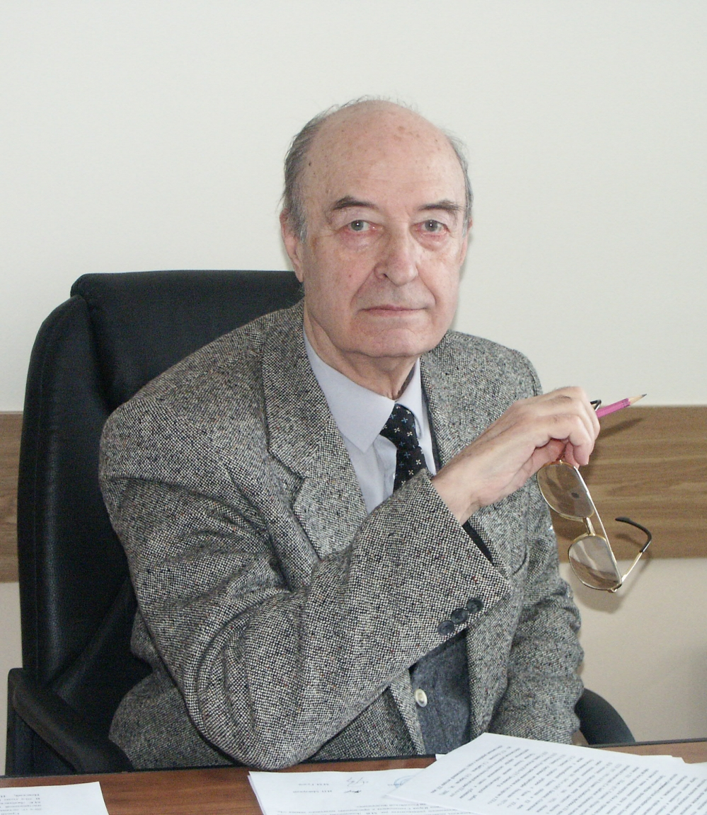 Кукушкин, Юрий Степанович